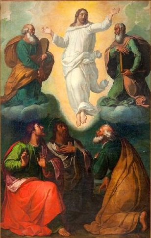 La obra representa la Transfiguración de Jesucristo, y es atribuida por algunos autores al pintor Miguel Barroso.